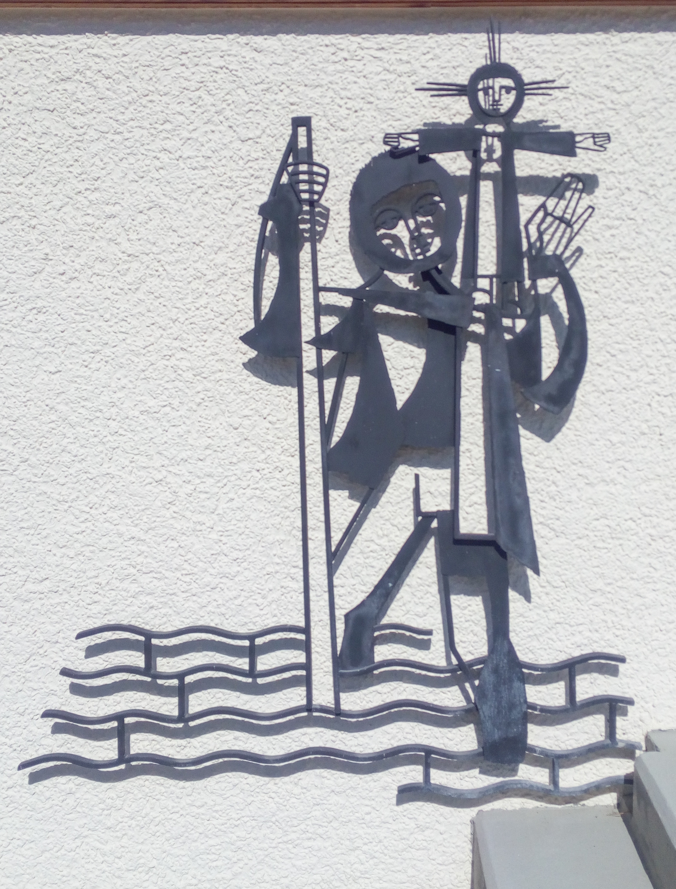 Römisch-katholische Christophoruskapelle Hasliberg. Schmiedeiserne Plastik am Eingang von Bruno Imfeld.